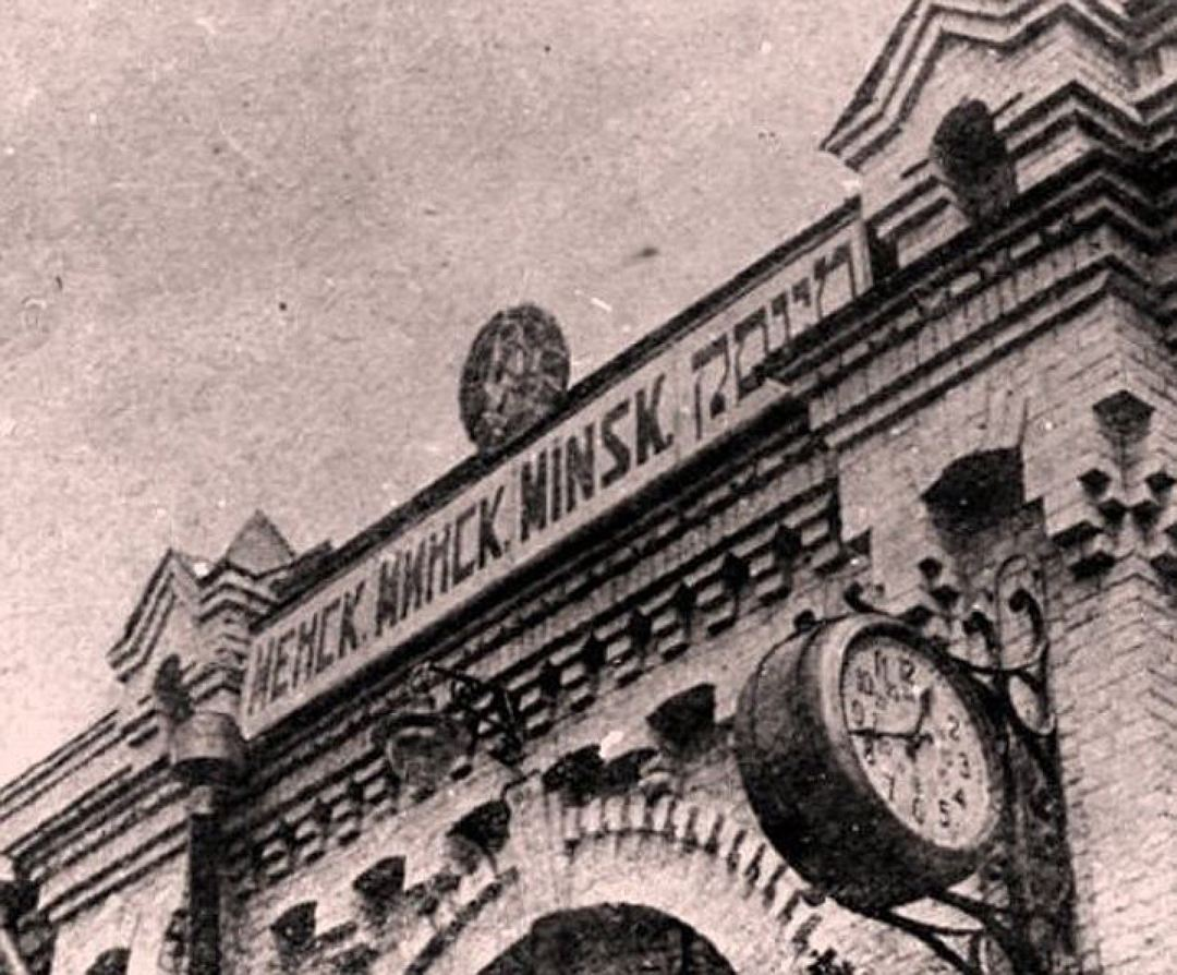 Беларуская (тарашкевіца): Менск (Miensk), вакзал Віленскі (Vilenski)